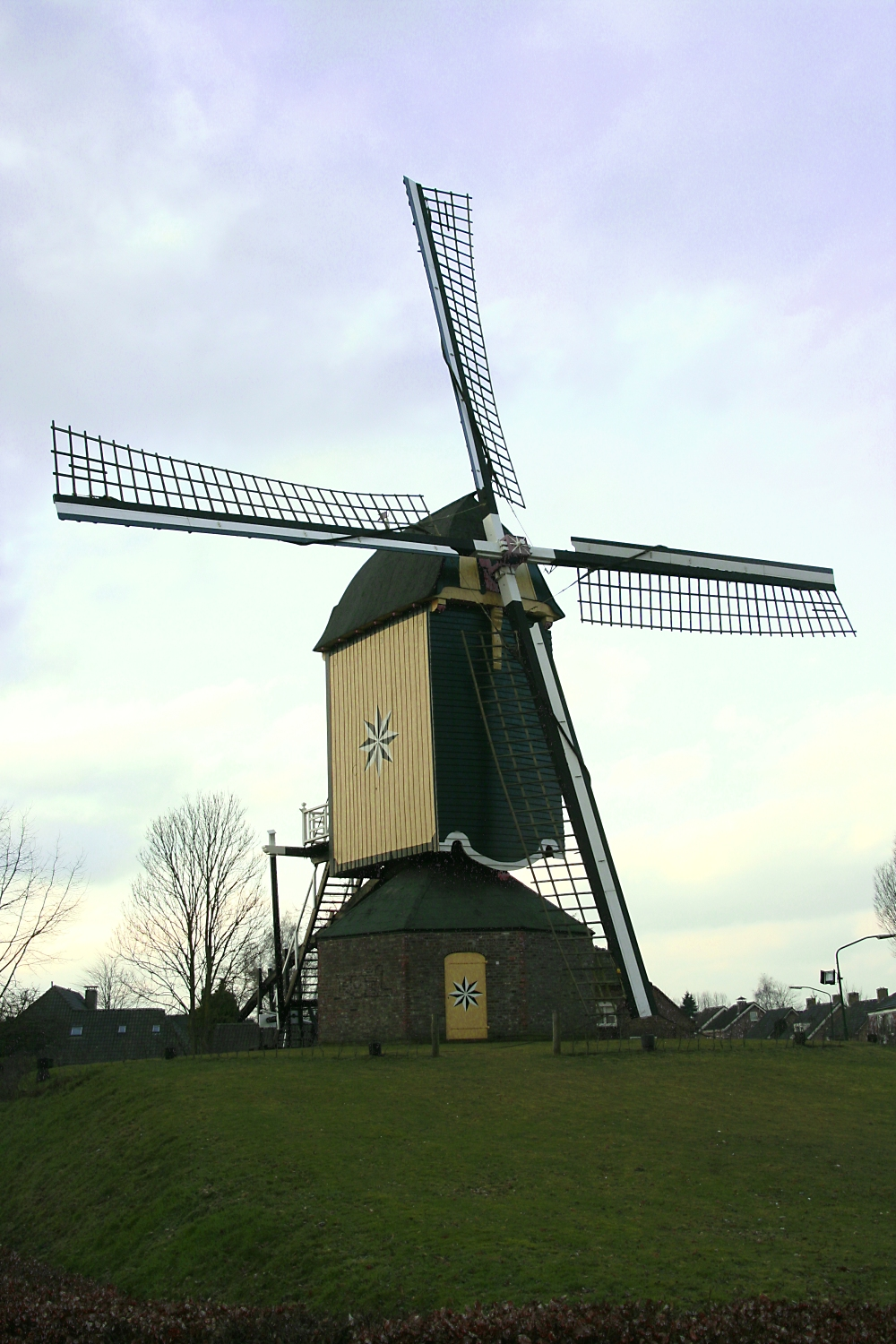 Nistelrode - Molen Windlust